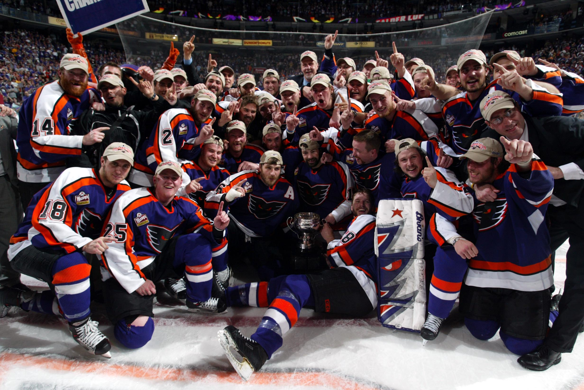 Photo: Bruce Bennett/AHL